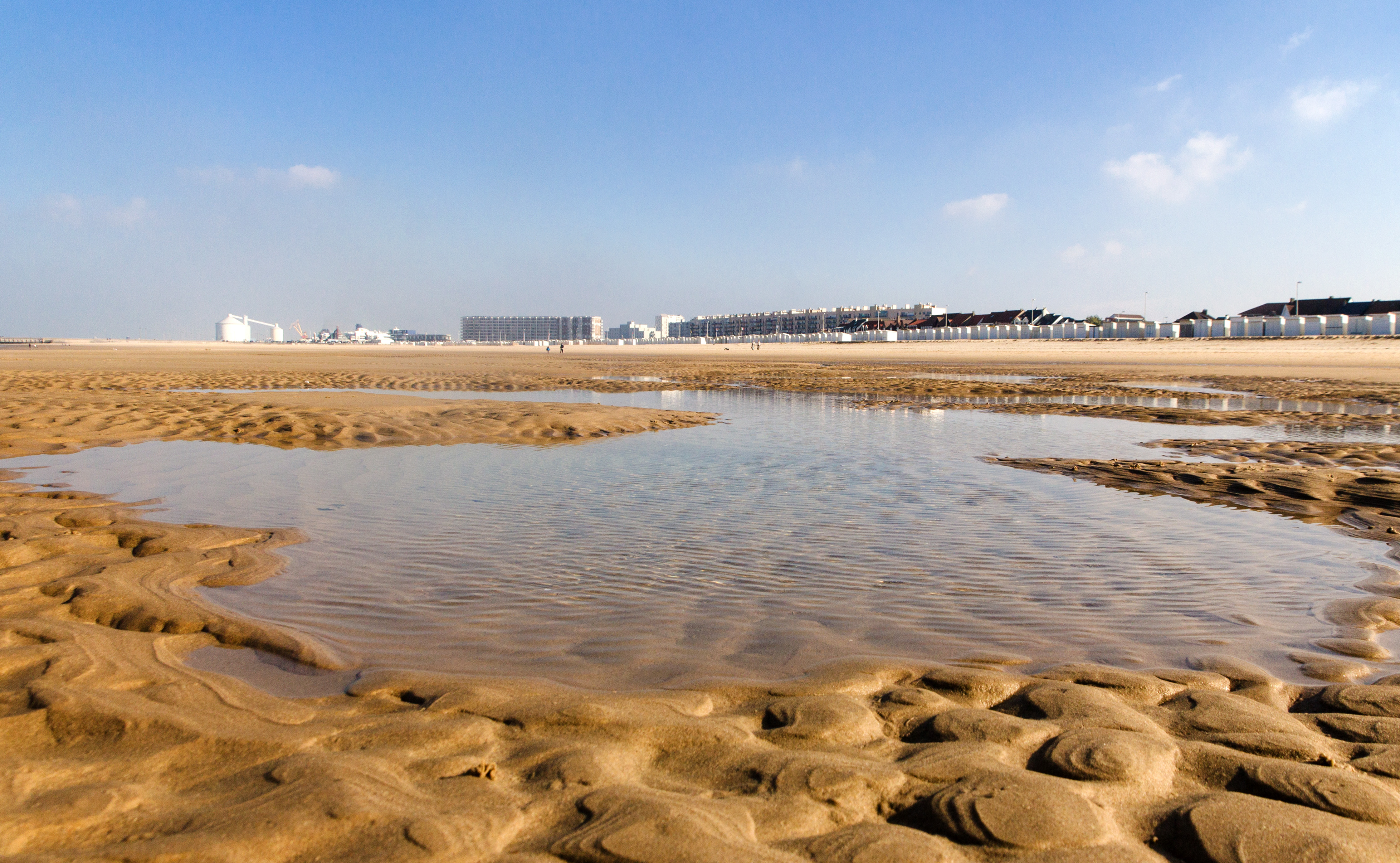 Plage de Calais, October, 2016